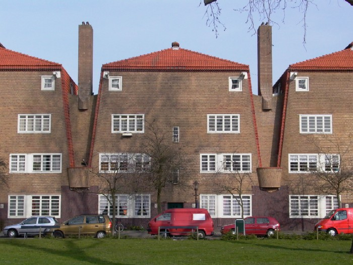 Foto gemaakt door Daniel van der Ree